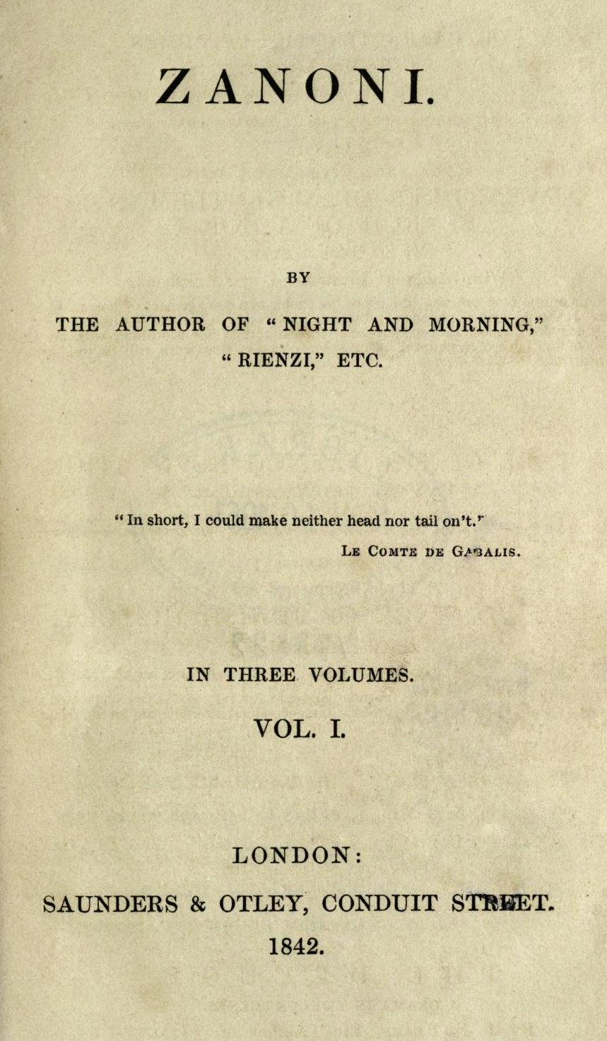 Zanoni 1st ed title pg